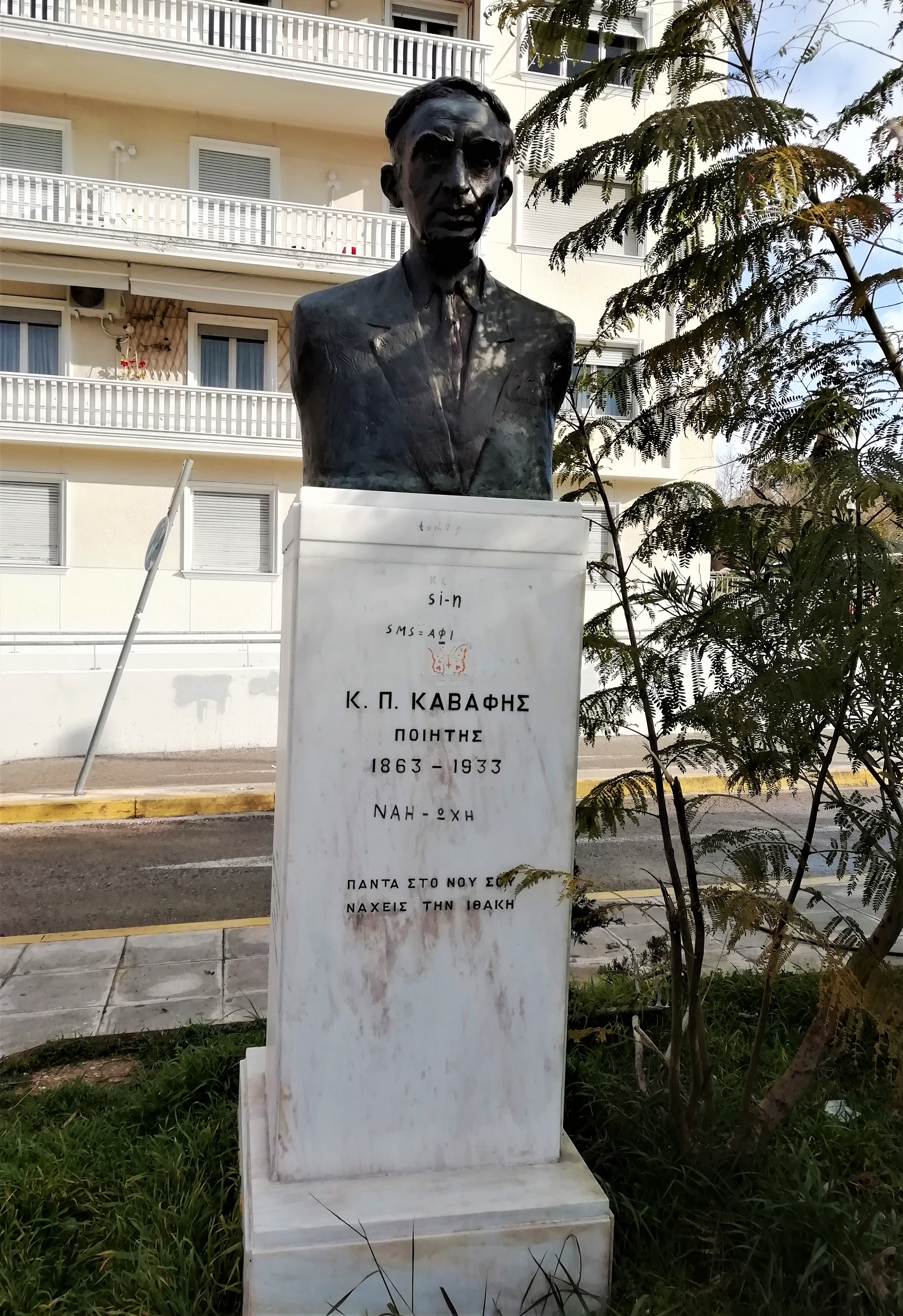 Pomnik poety Kontandinosa Kawafisa w Atenach